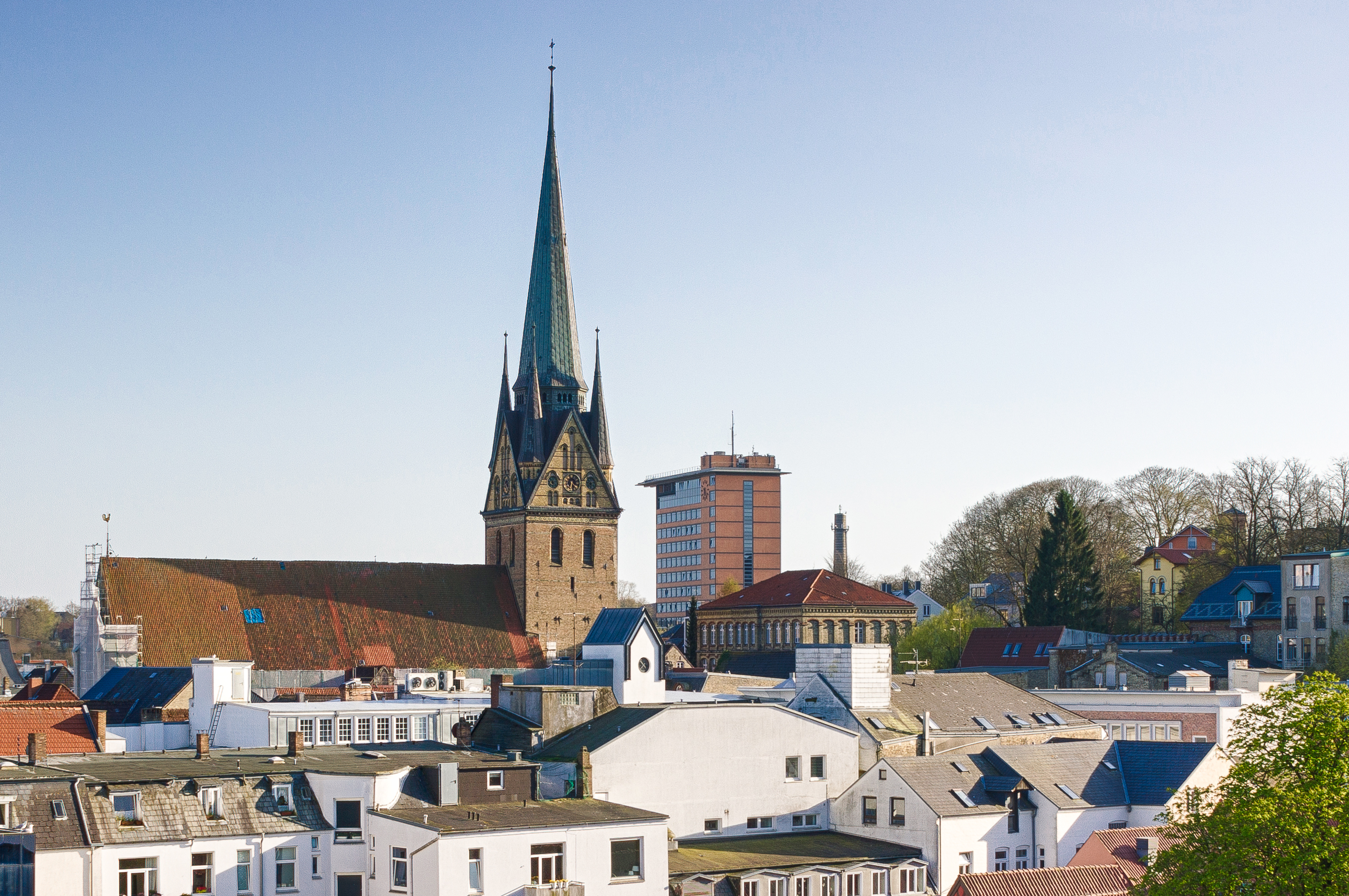 Die Sankt Nikolai Kirche und das Rathaus in Flensburg. April 2015 mit Baustelle an der Kirche